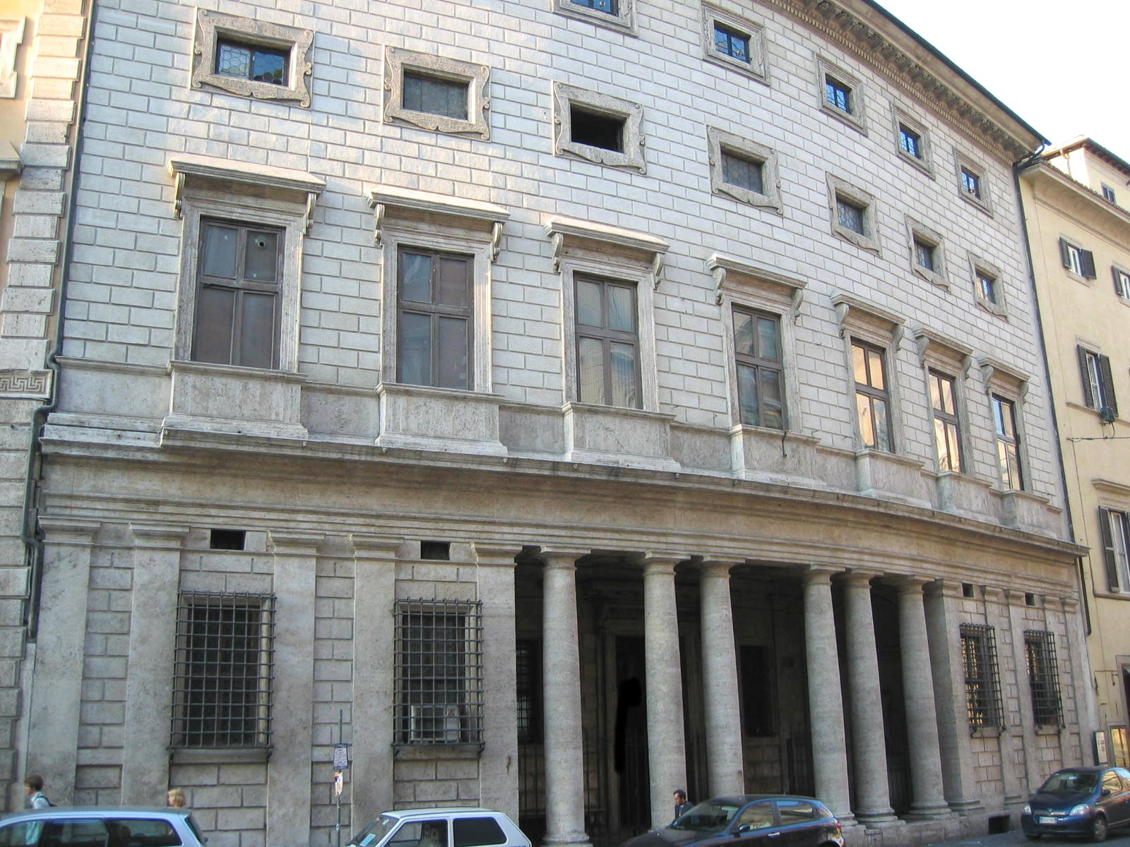 Palazzo Massimo alle Colonne, Roma. Architect: Baldassarre Peruzzi